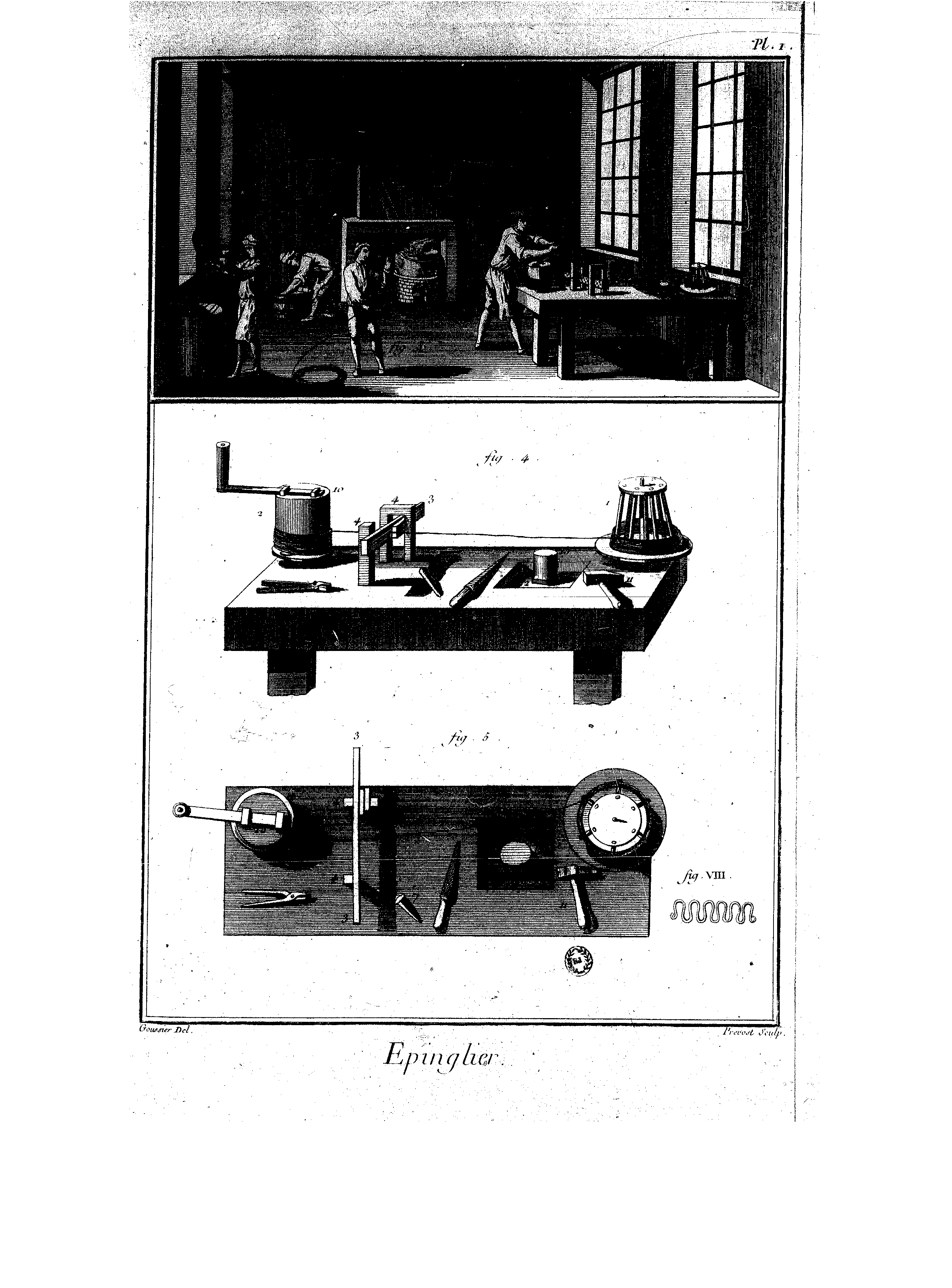 Planches de l'Encyclopédie de Diderot et d'Alembert, volume 3